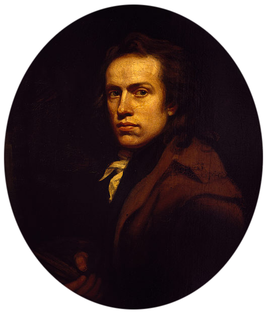 Self-portrait